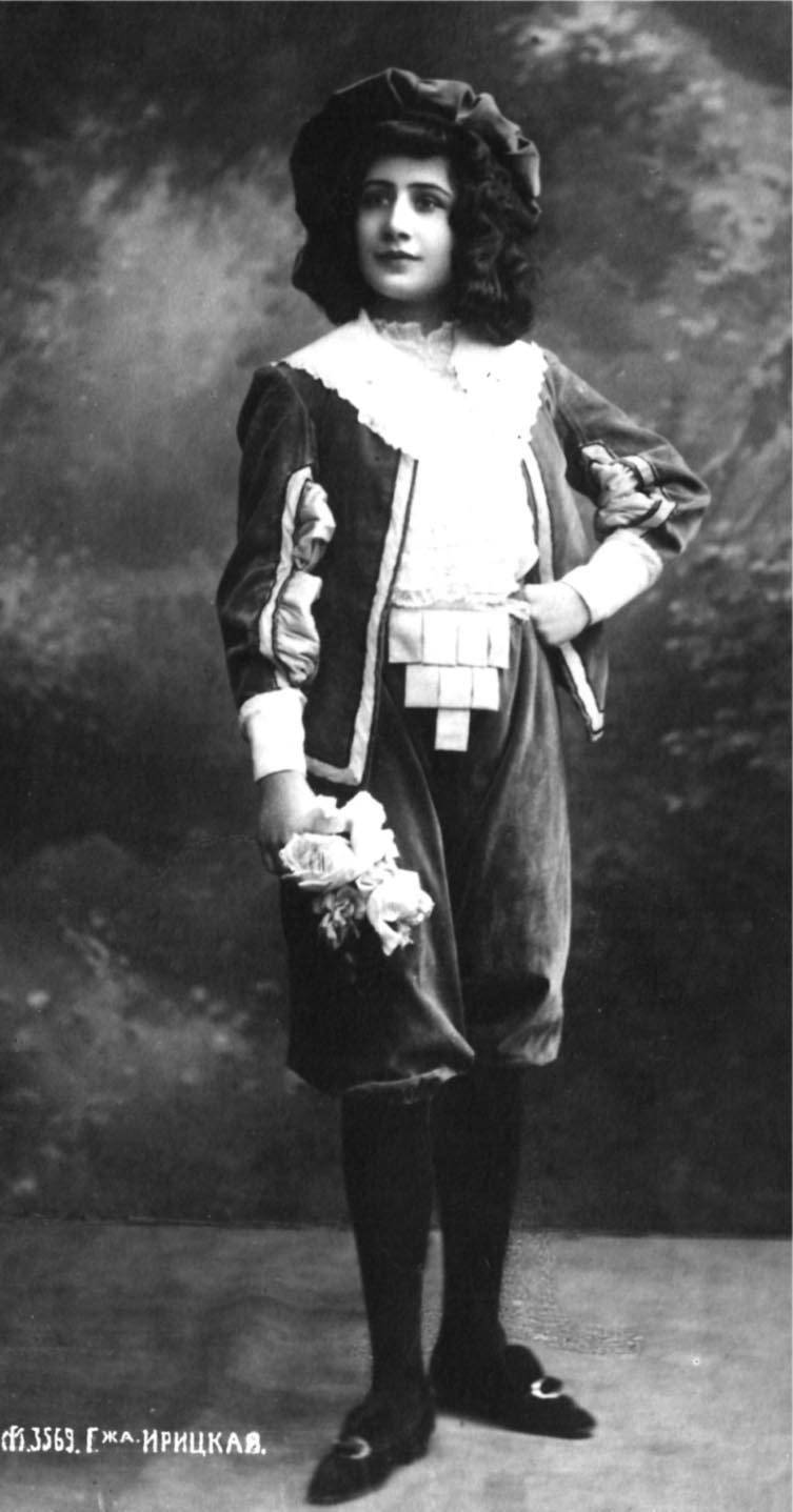 Ирецкая, Наталия Александровна